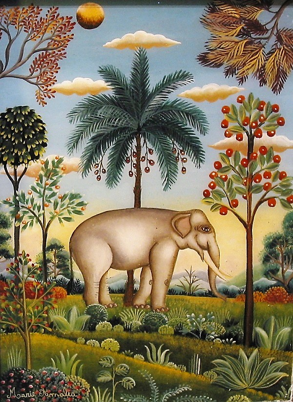 tableau